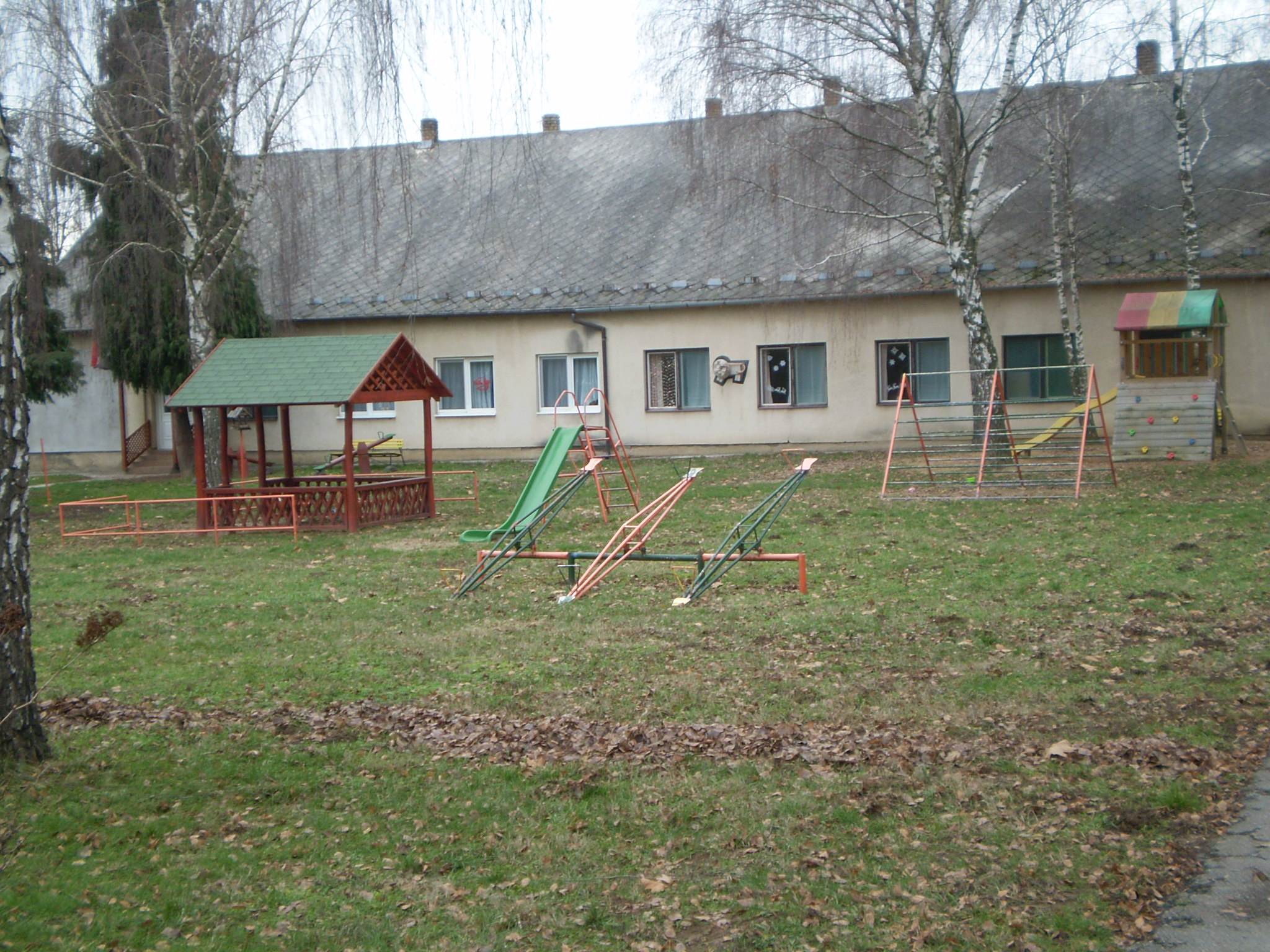 Óvoda, Baksa (Rádfai út 2)